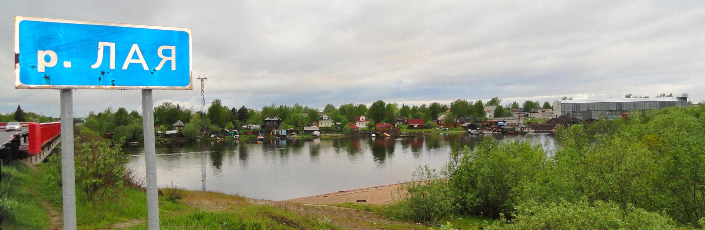 Река Лая (в месте пересечения дороги Северодвинск-Архангельск)